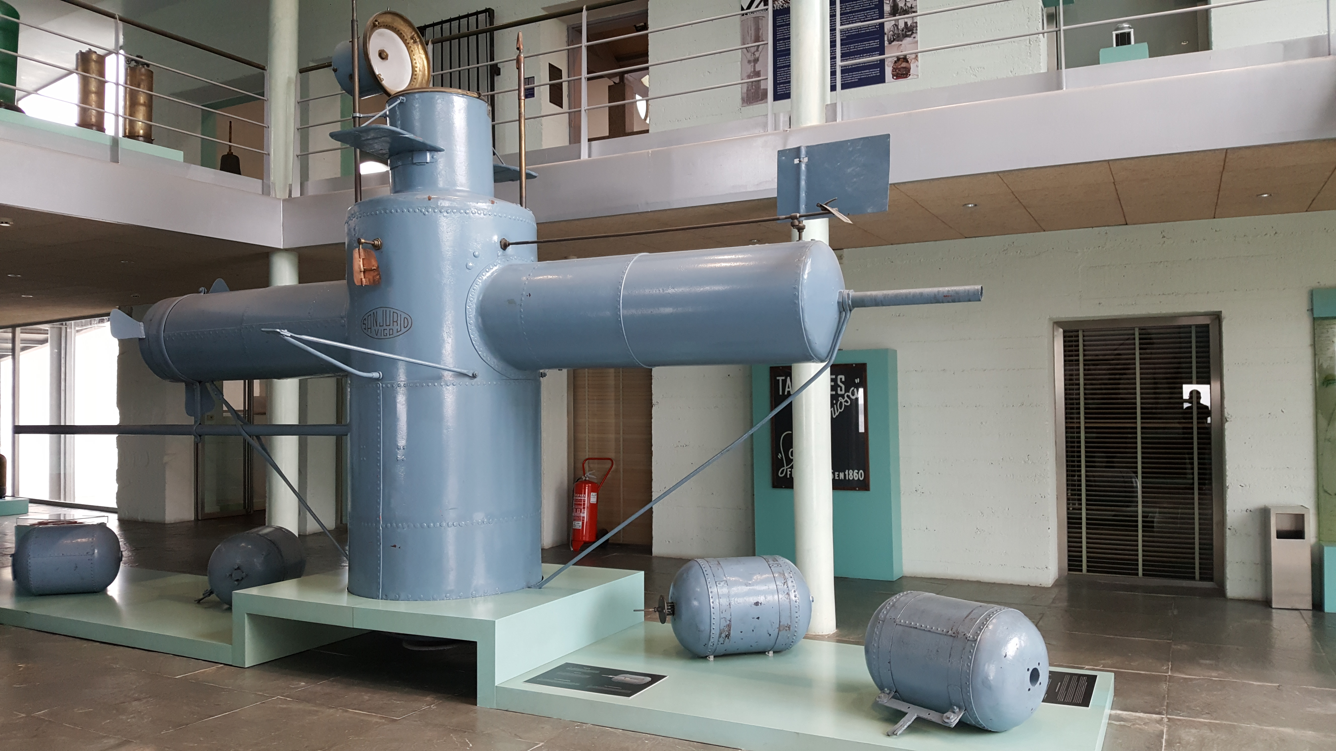 Boia lanzatorpedos de Sanjurjo Badía, submarino construído en Vigo a finais de 1800, é unha das pezas estrela do museo.